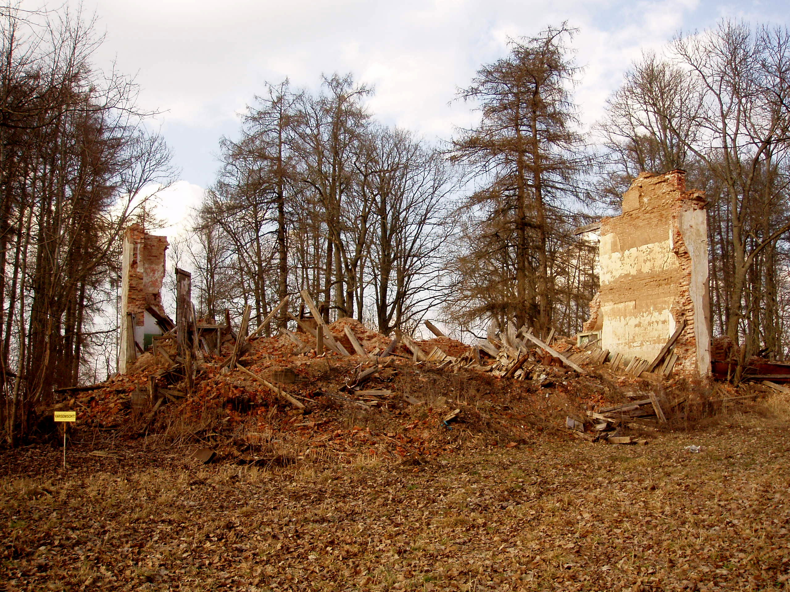 Vara mõisa peahoone varemed 2008. aastal